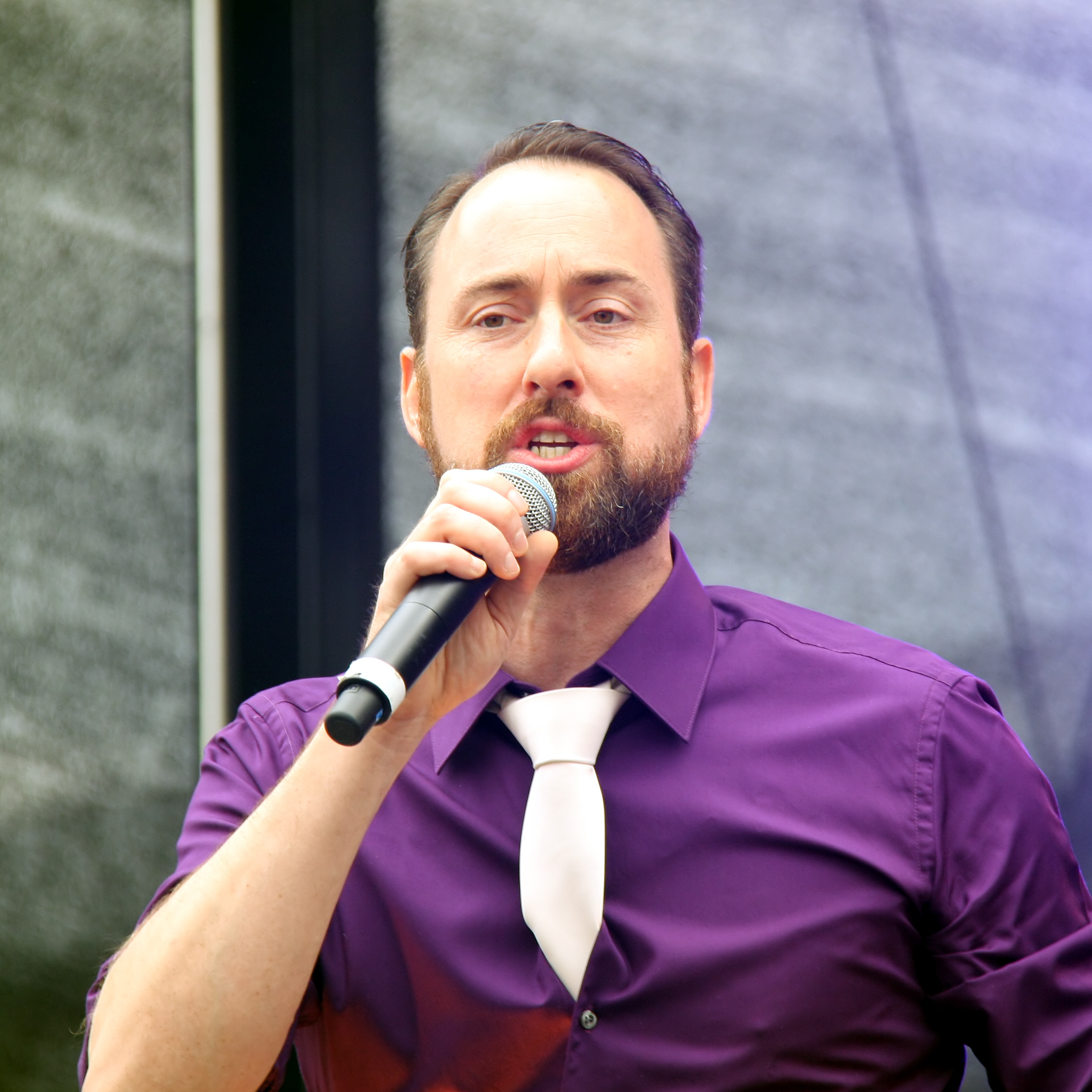 Holger Edmaier. Auftritt mit Vanessa Maurischat mit Ausschnitten aus ihrem Programm „Nacktbaden“. Bühnenprogramm zum CSD-Straßenfest/ColognePride 2011. Hauptbühne auf dem Heumarkt, Köln.